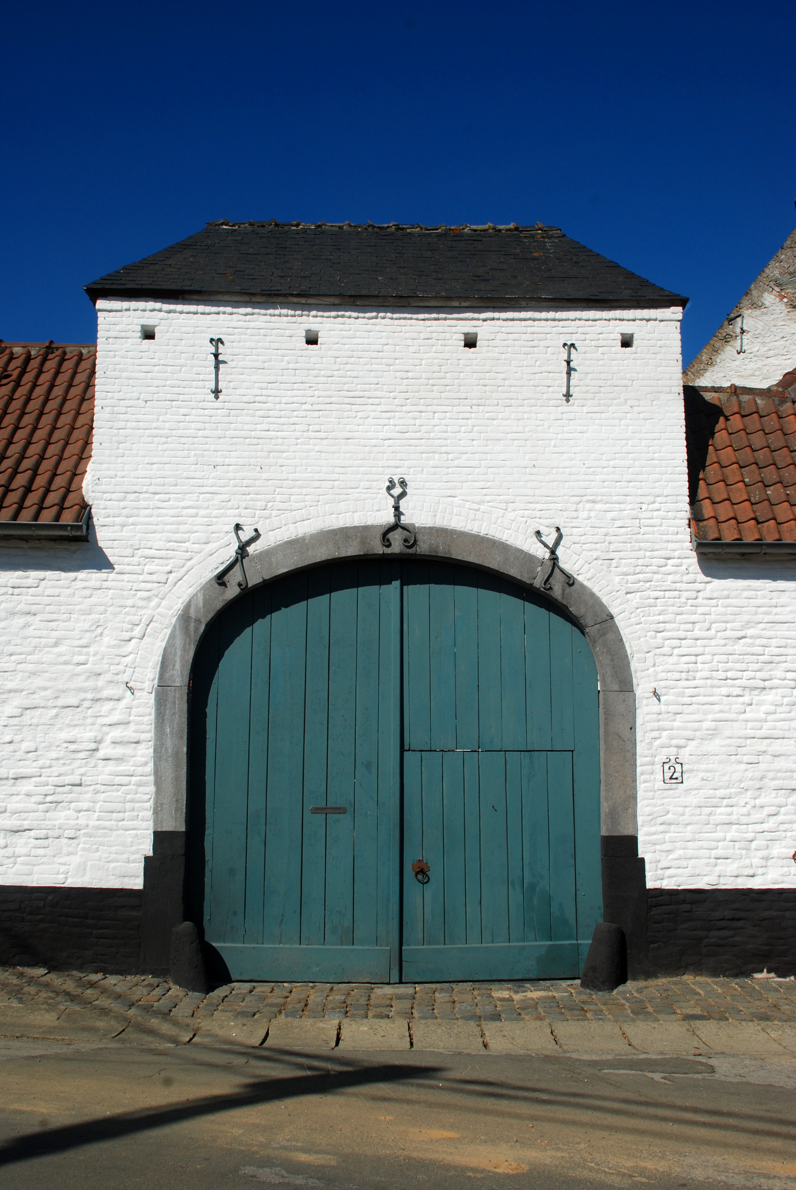 Belgique - Brabant wallon - Court-Saint-Étienne - Ferme de Beaurieux